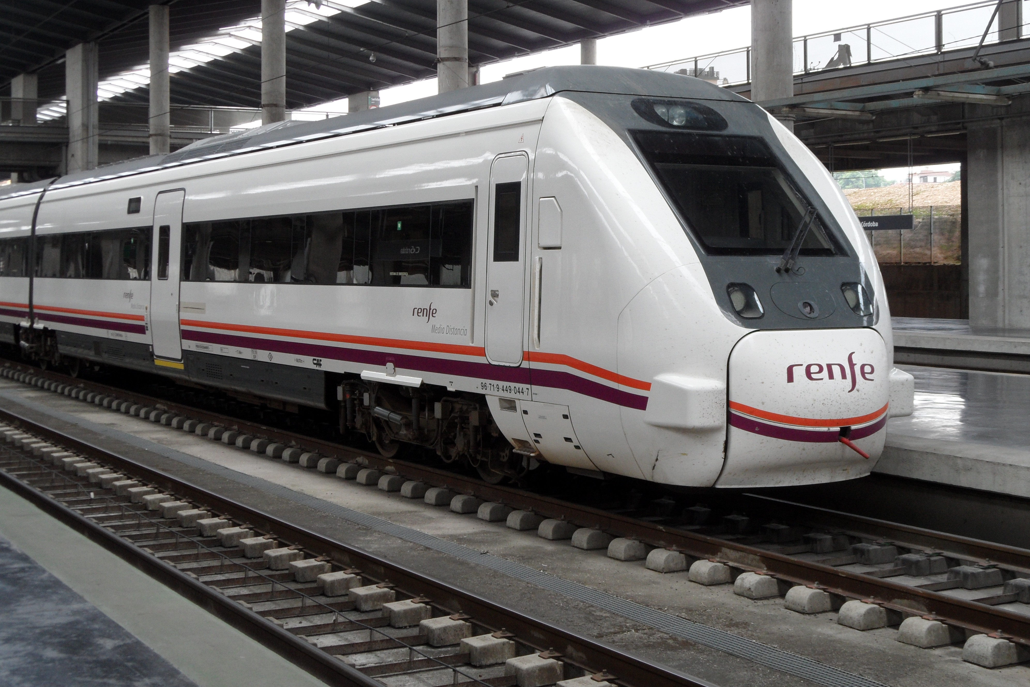 Mittelstreckentriebzug auf Breitspur in der Bahnhofshalle von Córdoba C